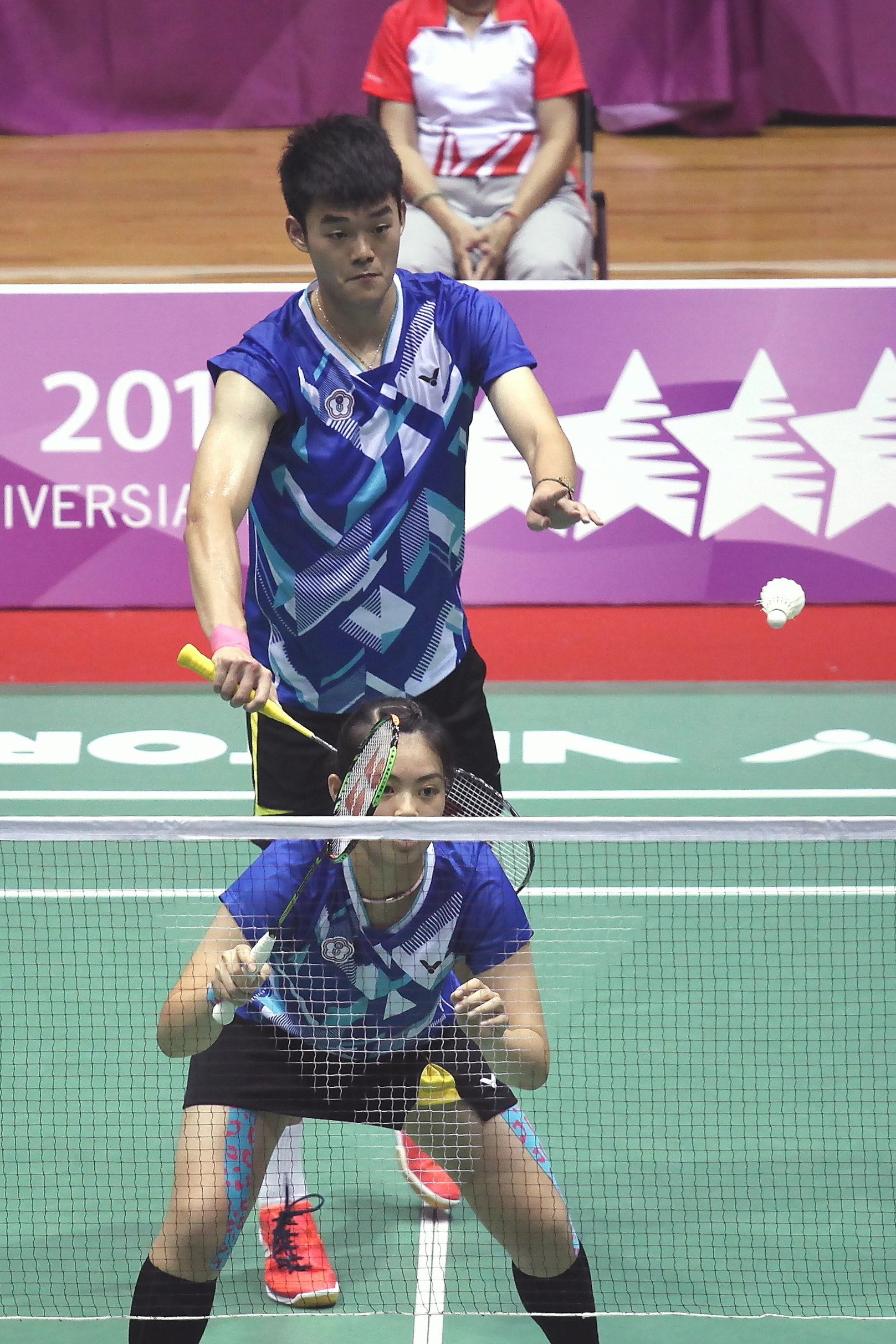 2017 臺北世大運個人混雙 王齊麟 01